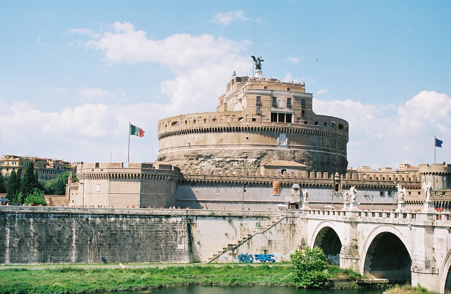 Castel Sant'Angelo, Roma, Italy.005148-R1-13A